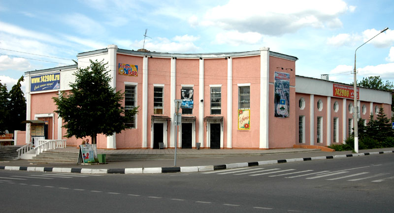 Sovetskaja-kadun elokuvateatteri.